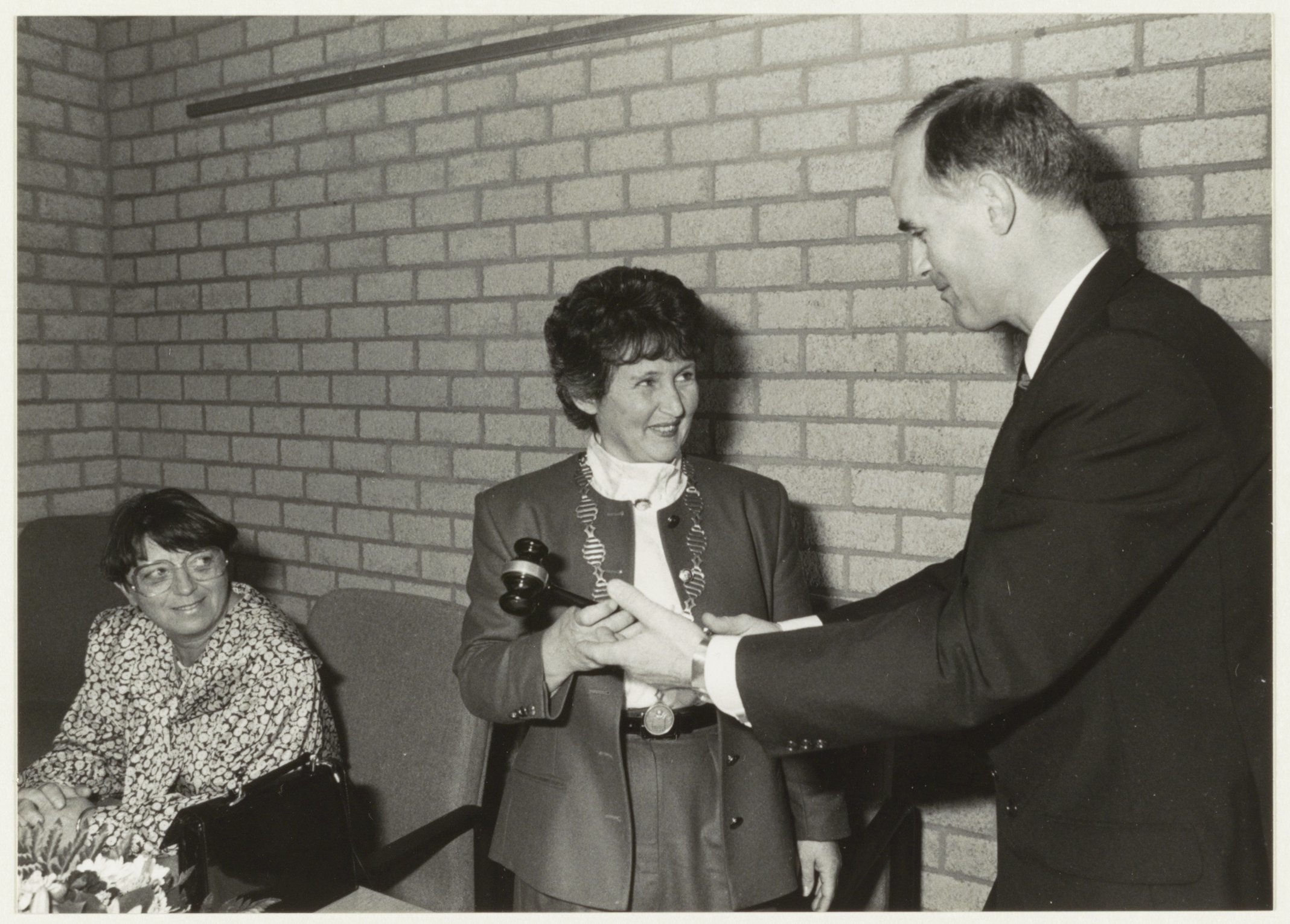 CollectieCollectie Fotoburo de BoerInventarisnummerNL-HlmNHA_54031600BeschrijvingInstallatie burgemeester Dalhuisen. Mevr. Dalhuisen krijgt de burgemeestershamer uit handen van loco-burgemeester Zwetsloot.FotonummerNL-HlmNHA_1478_0109DocumenttypeHistorieprenten, tekeningen en foto'sVervaardigerBoer, Poppe de Soort vervaardigerFotograaf Annotaties31535 k 15 aHD.171189PersonenZwetsloot, K.B.F.M.Dalhuisen-Polano, Catherina Elisabeth (Liesbeth) (*1940) Functies personenloco-burgemeester, burgemeester LandNederland ProvincieNoord-Holland GemeenteBloemendaal PlaatsBennebroek StraatBennebroekerlaan Begindatum11-1989Einddatum11-1989TechniekFoto TrefwoordenBurgemeesters